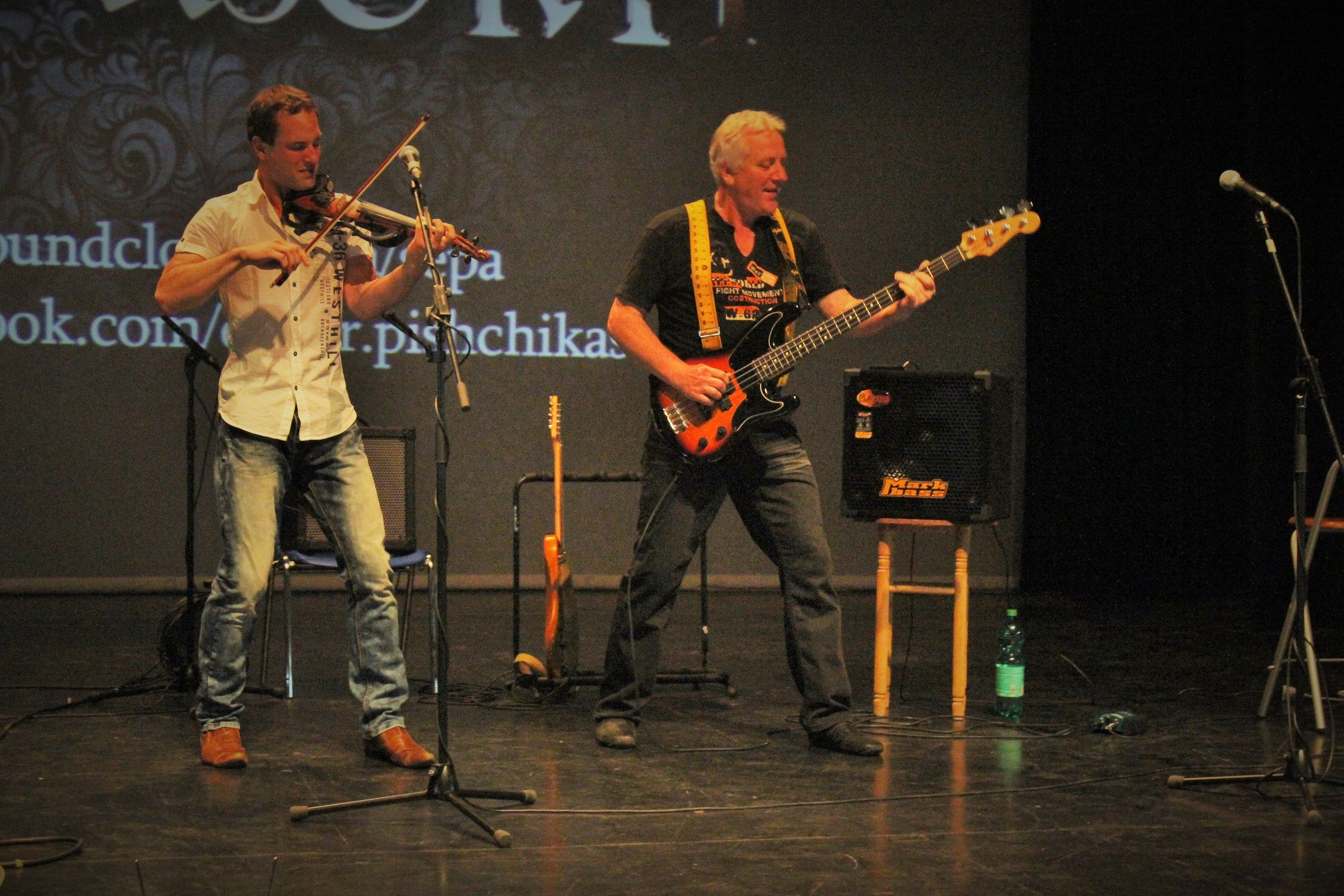 Asorti en Herrera del Duque dum Hispana Esperanto Kongreso